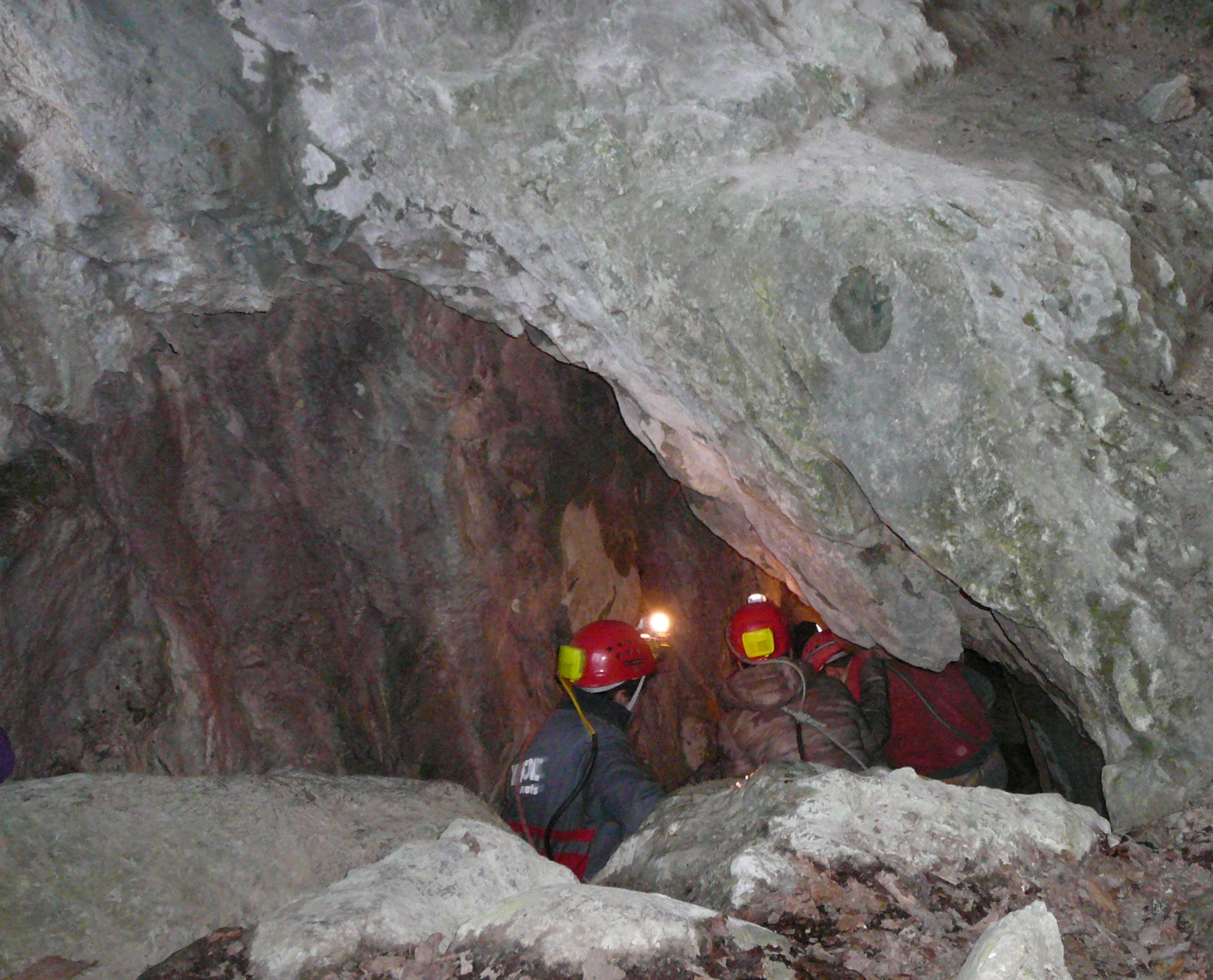 Bus dela Spia